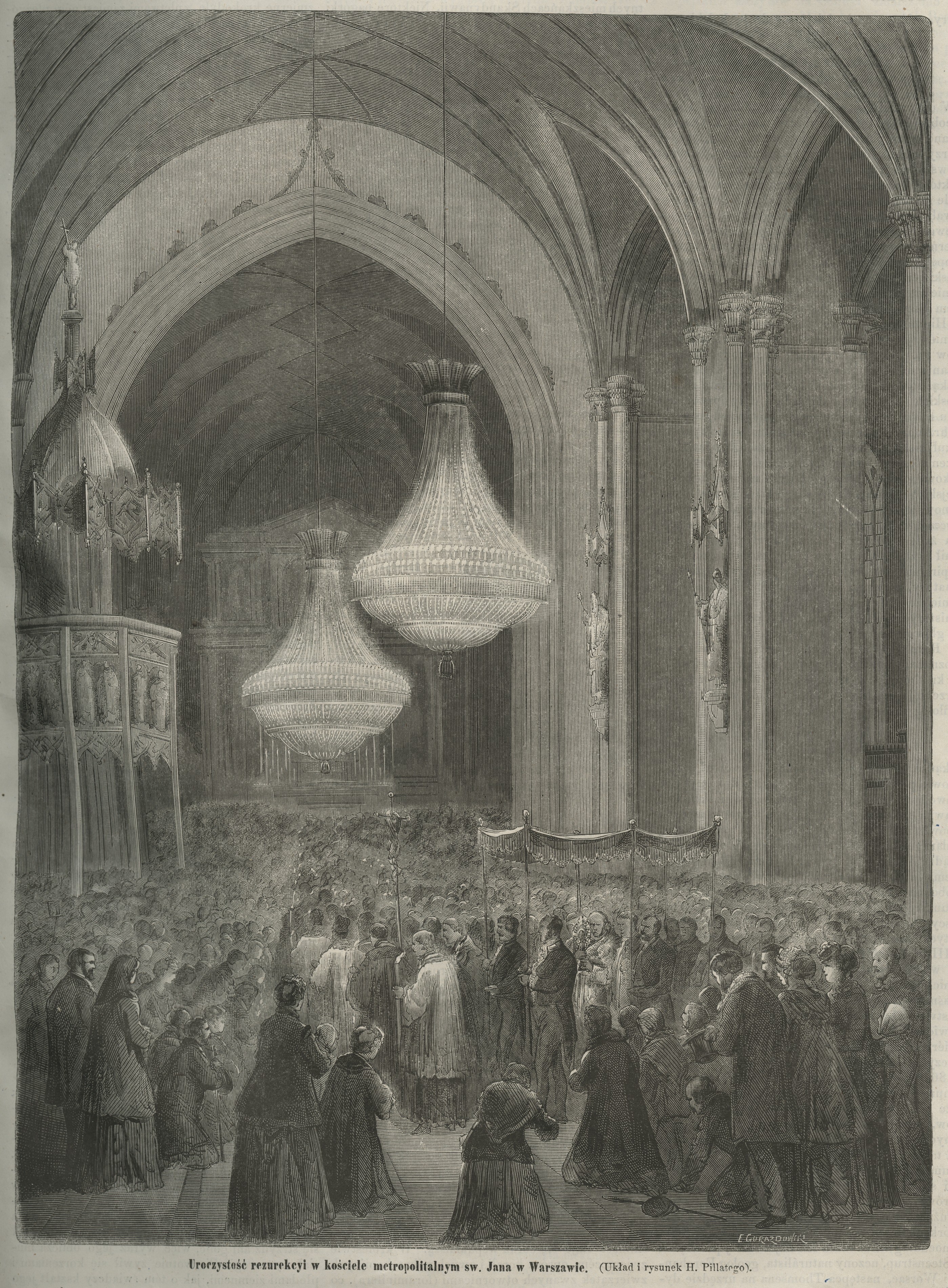 Uroczystość rezurekcyi w kościele metropolitalnym sw. Jana w Warszawie : (Układ i rysunek H. Pillatego)